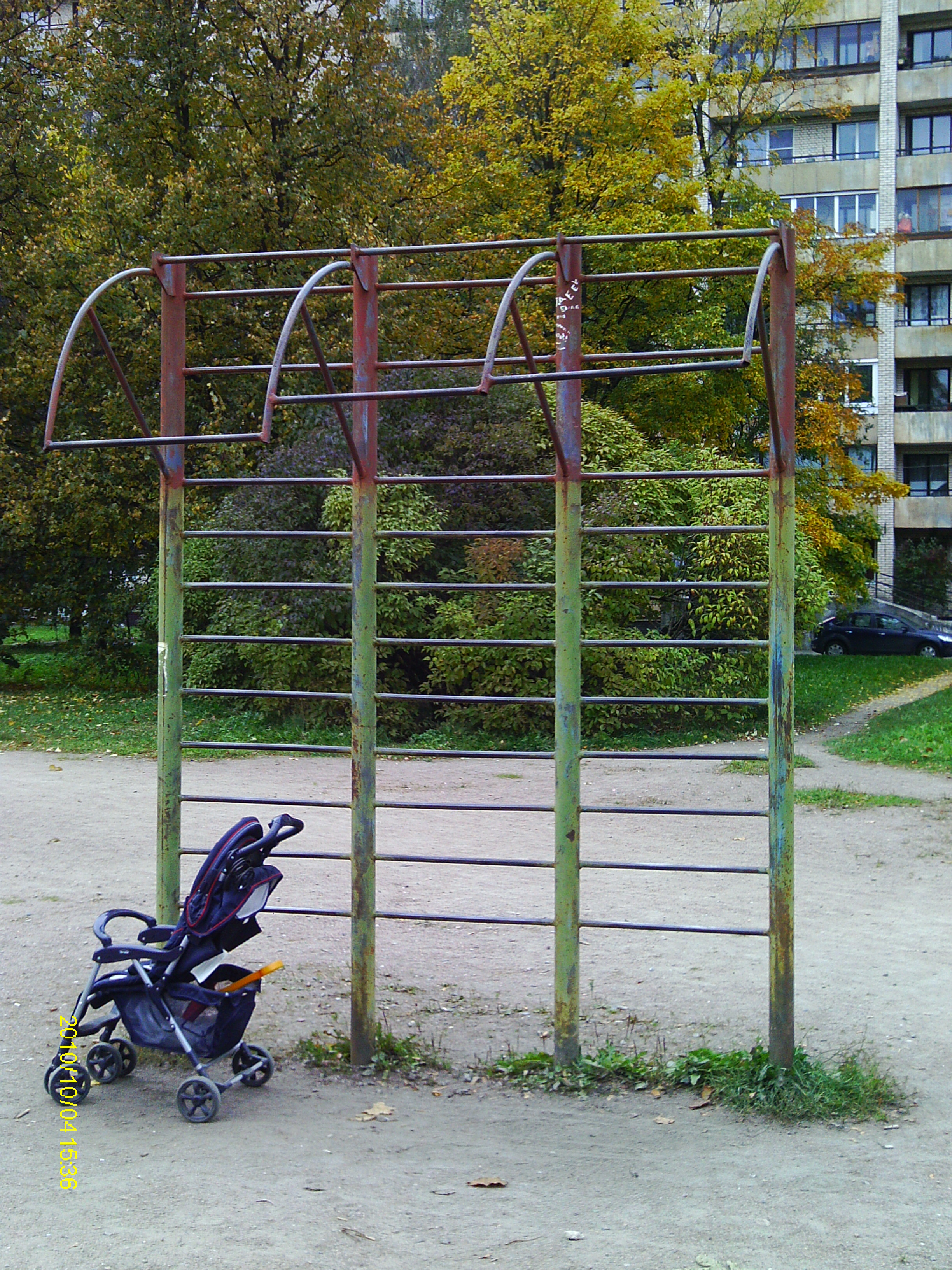 Турники такого типа широко распространены в бывшем СССР